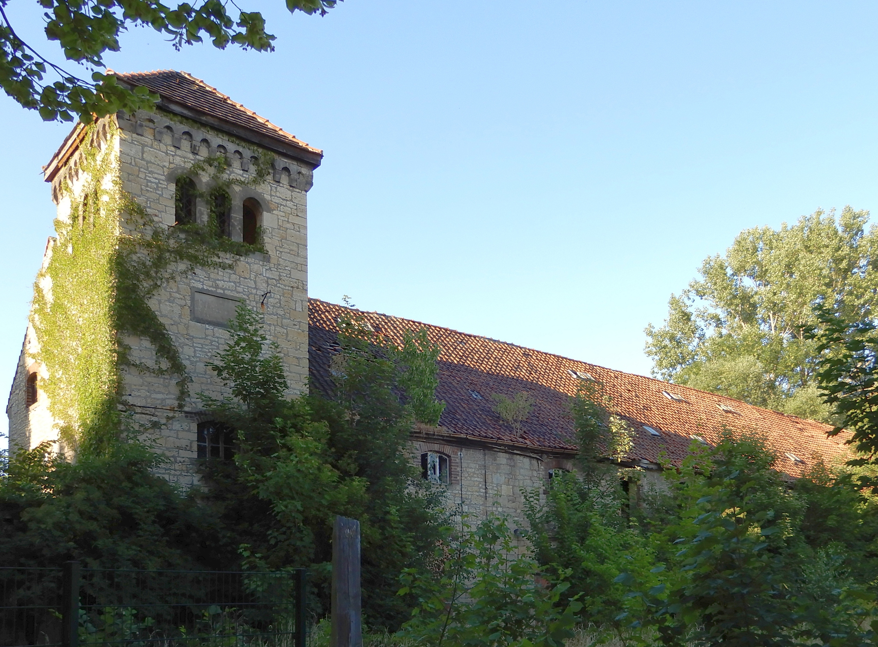 Gatersleben, Lange Straße 7-7a